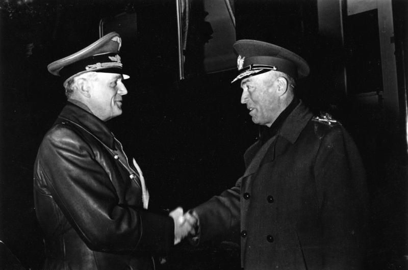 Joachim von Ribbentrop und Ion Antonescu Reichsaußenminister von Ribbentrop begrüßt Marschall Antonescu Der Staatsführer Rumäniens, Marschall Antonescu, weilte bekanntlich in Begleitung des stellvertretenden Ministerpräsidenten Mihai Antonescu und weiterer rumänischer Persönlichkeiten im Hauptquartier des Führers. Unser Bild zeigt Reichsaußenminister von Ribbentrop als er Marschall Antonescu [r.] am Zuge begrüßte. Bei Abdruck nennen: Scherl Bilderdienst (Laux) 14.1.1943 [Herausgabedatum] 756-43 Abgebildete Personen: Antonescu, Jon: Ministerpräsident, General, Rumänien (PND 11864968X) Ribbentrop, Joachim von: Außenminister, NSDAP, Deutschland